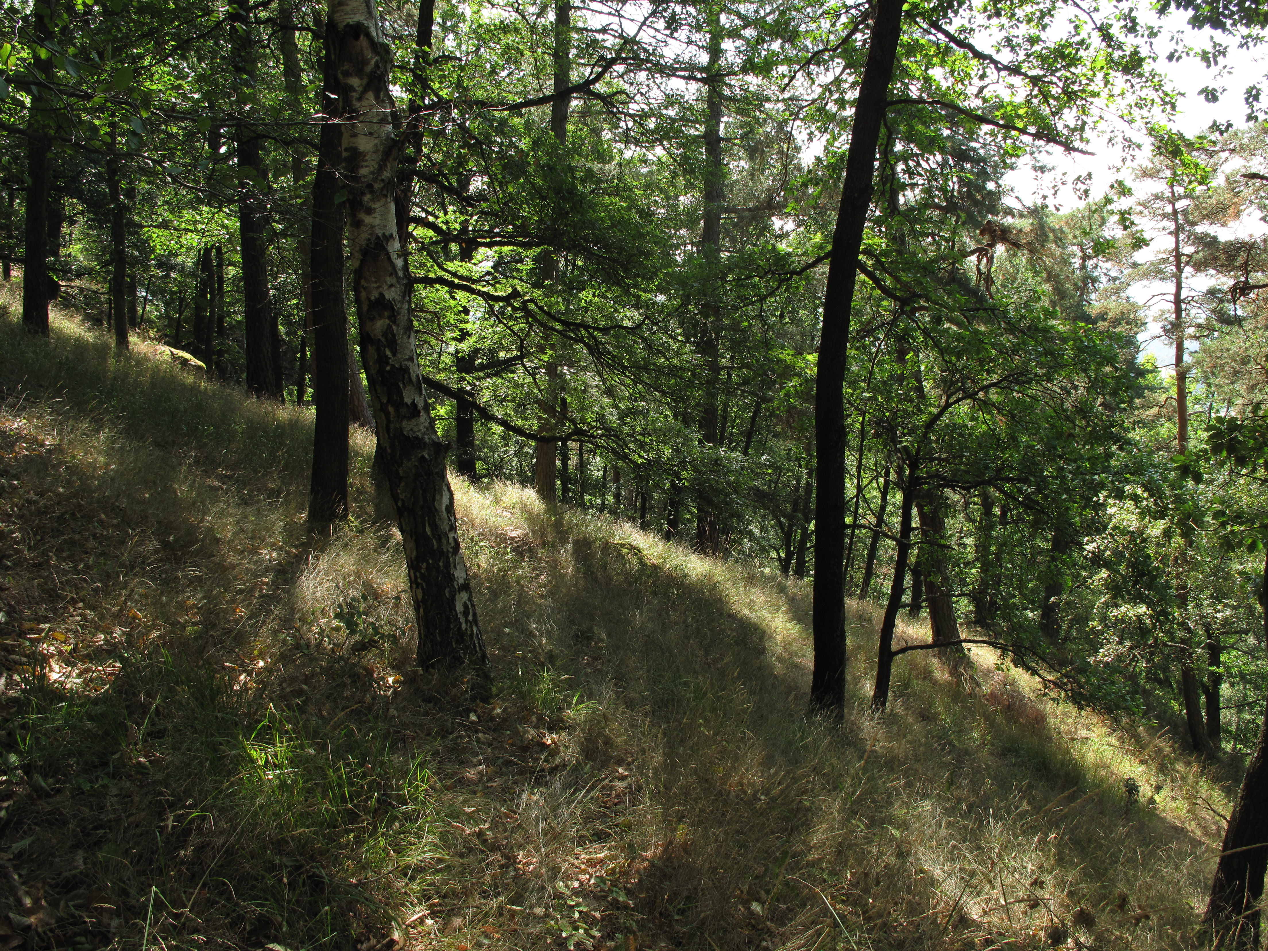 Přírodní rezervace Hradištský vrch. Okres Tachov, Česká republika.